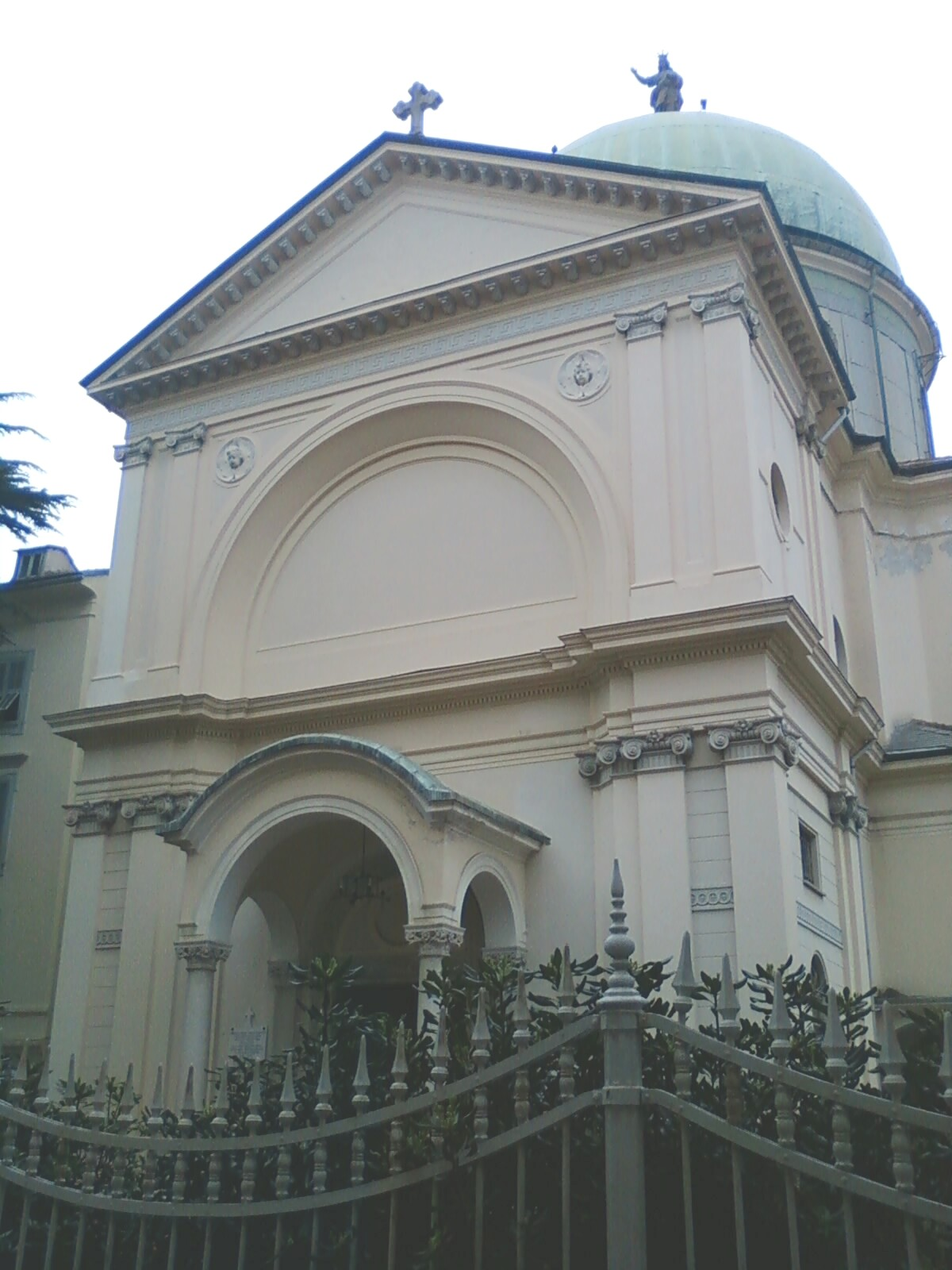 Chiesa di Stella Maris in Albisola Capo (Italy)